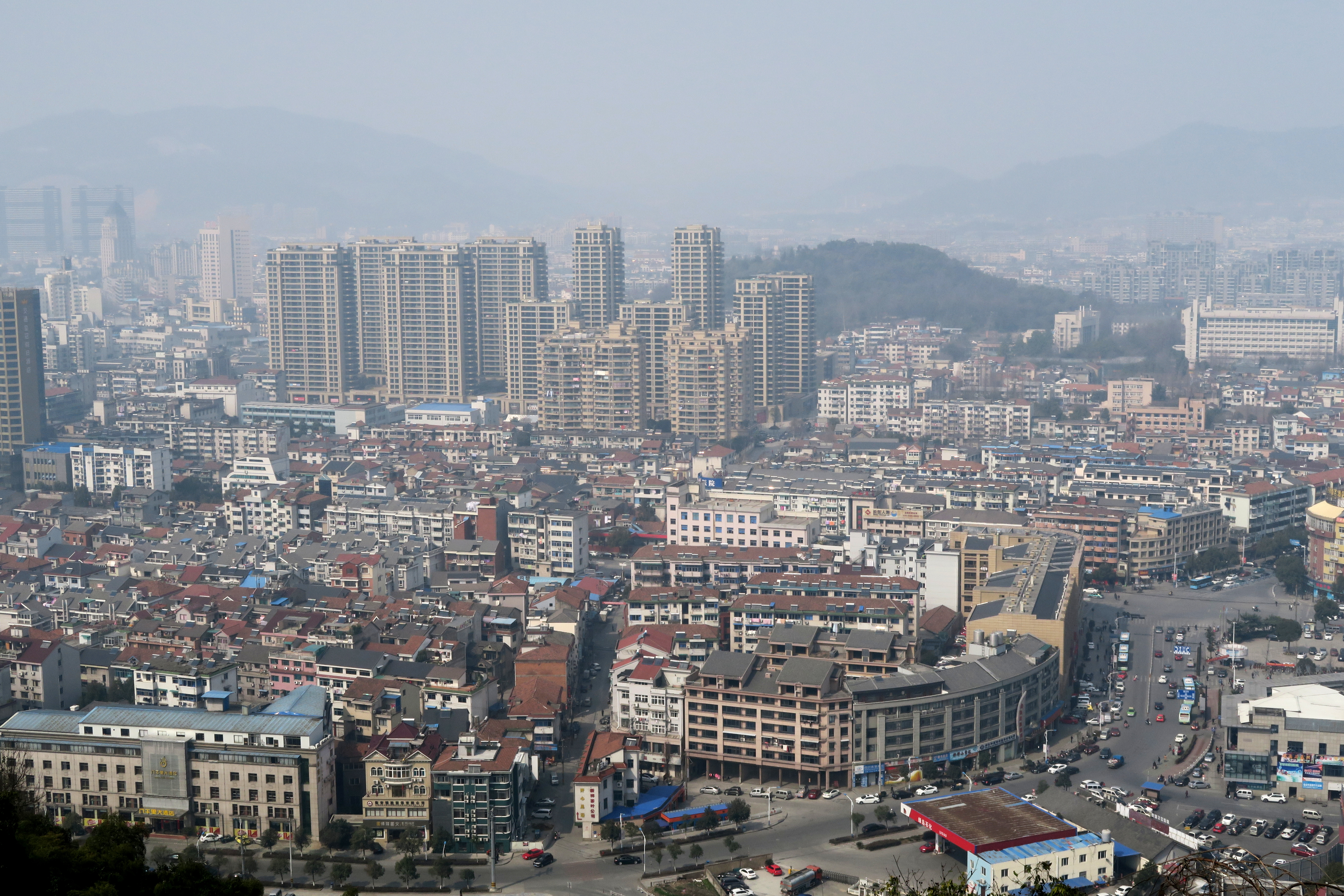 从功臣山看临安市